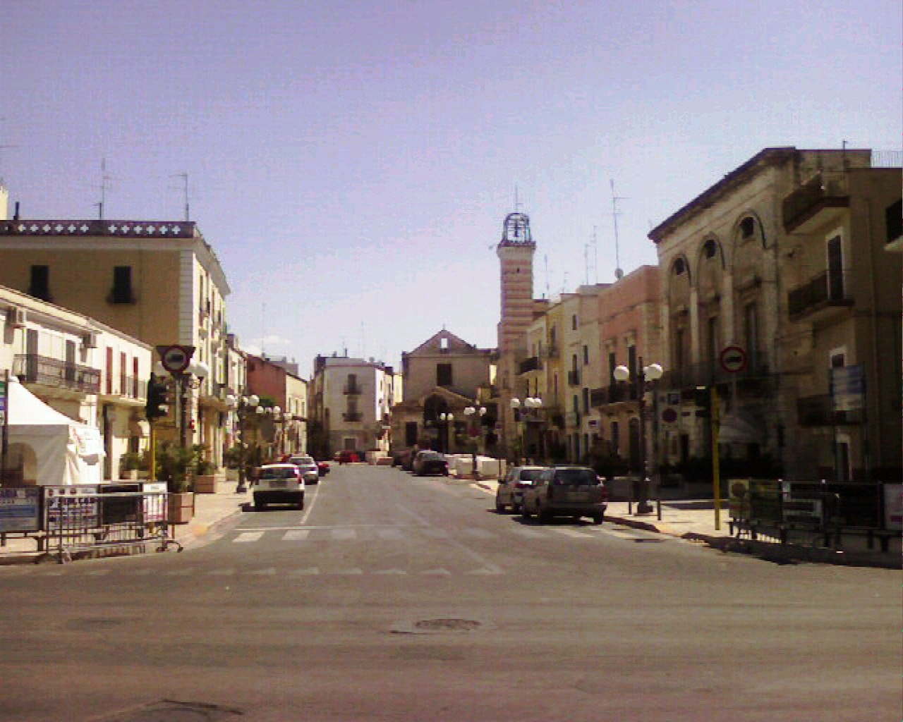 piazza sedile - Modugno (bari)-Italy